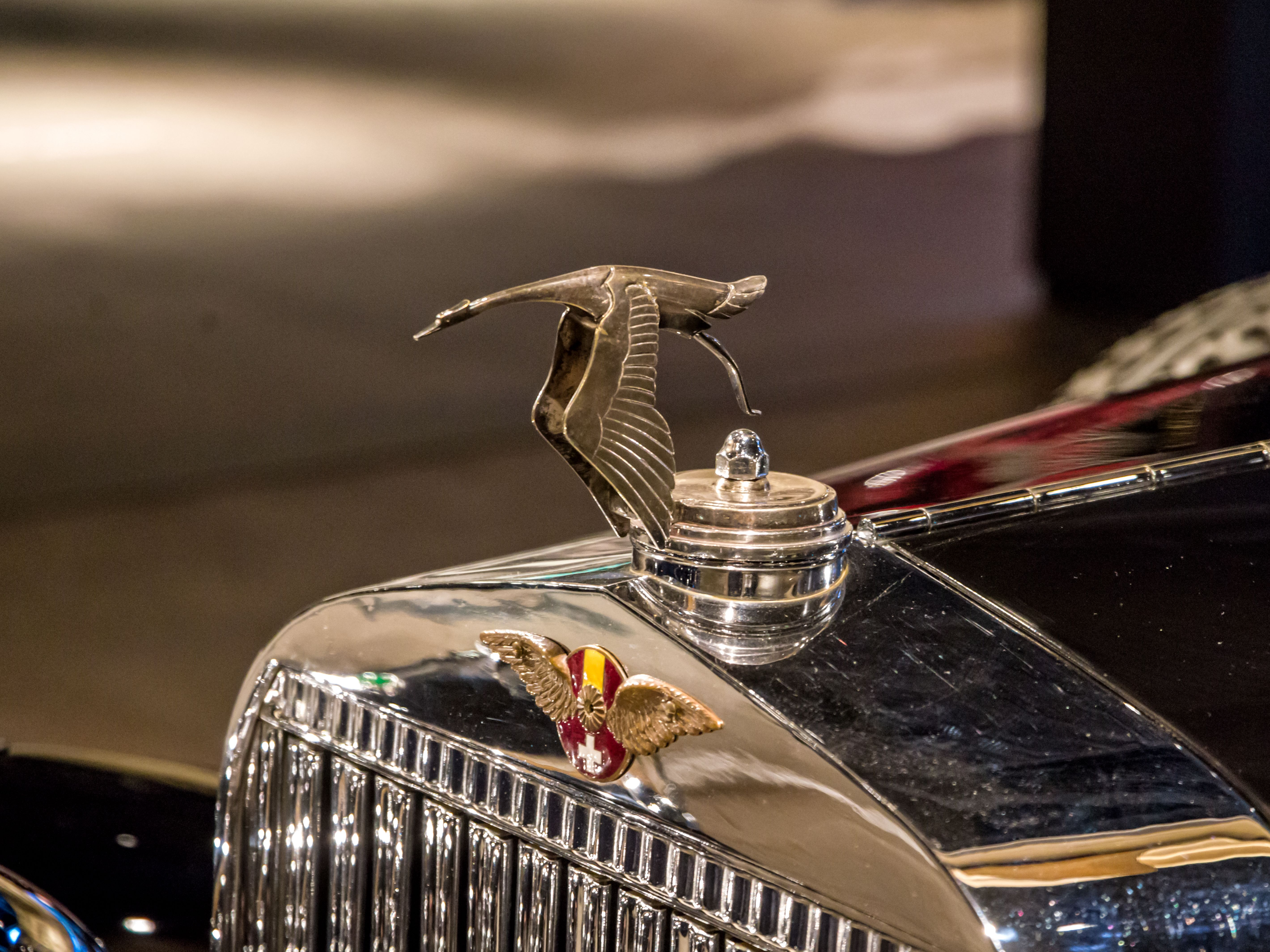 Das Volante Oldtimermuseum in Kirchzarten